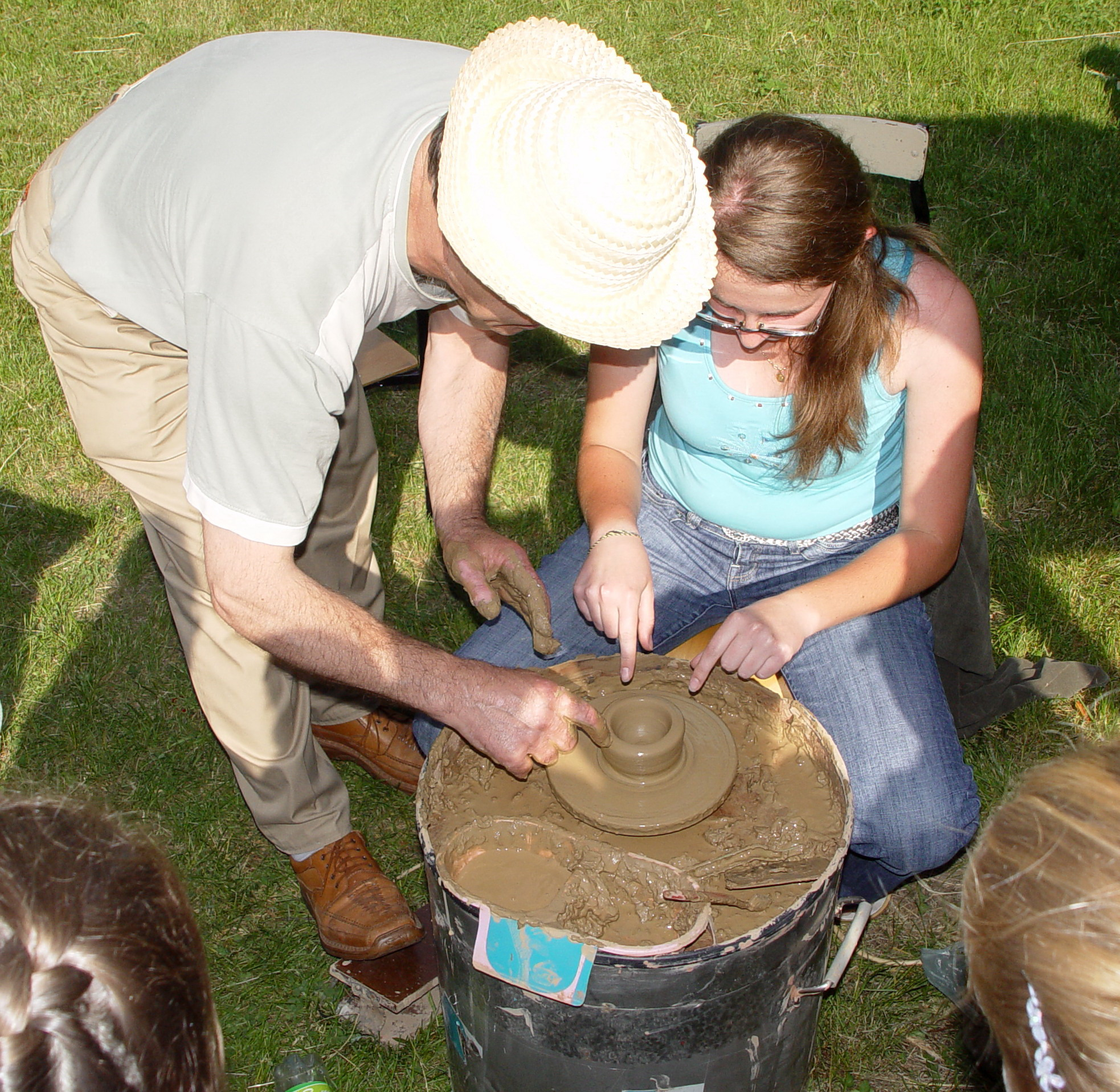 Elektryczne koło garncarskie